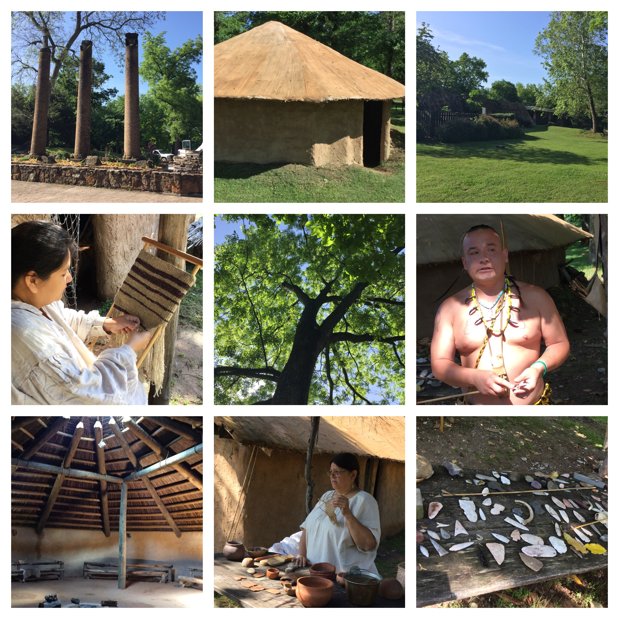 Cherokee Heritage Museum